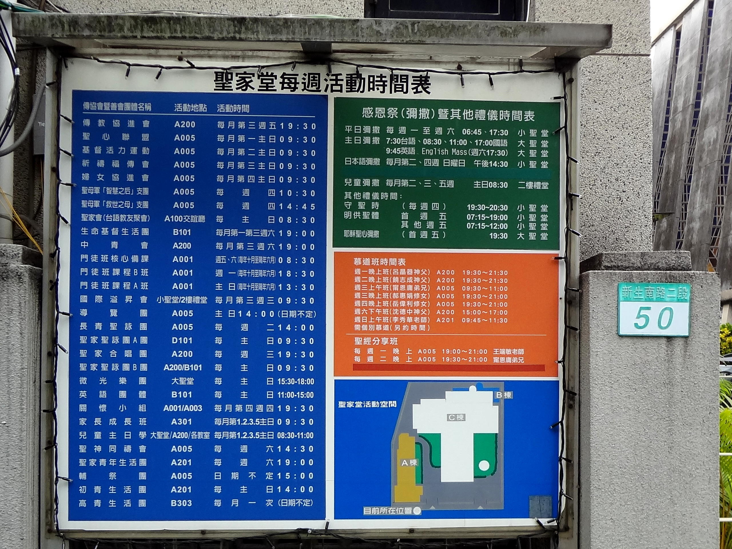 天主教台北總教區台北聖家堂每週活動時間表。